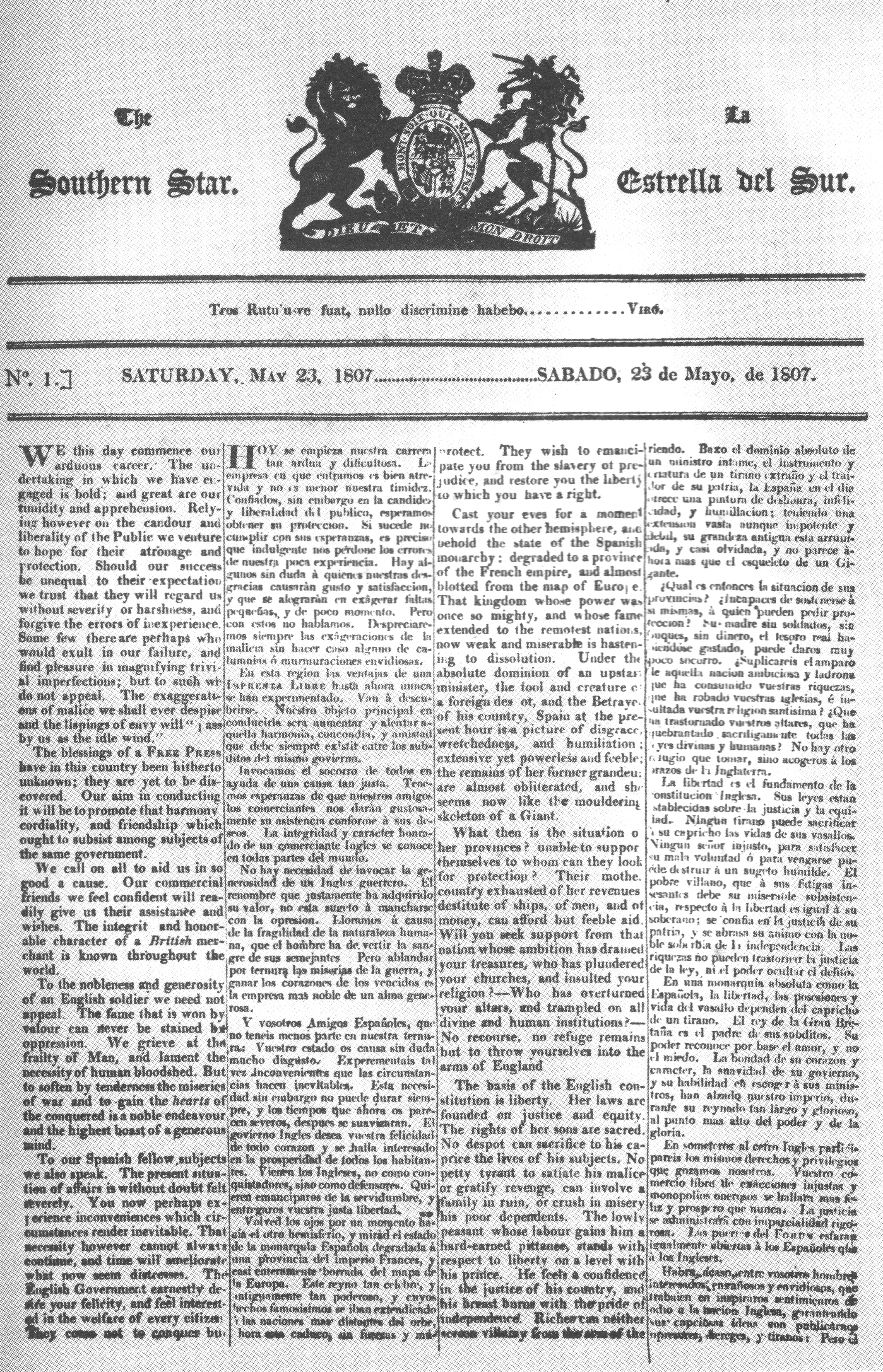 Página 1 del nº1 de la primer publicación periódica editada en el actual Uruguay: "La Estrella del Sur"